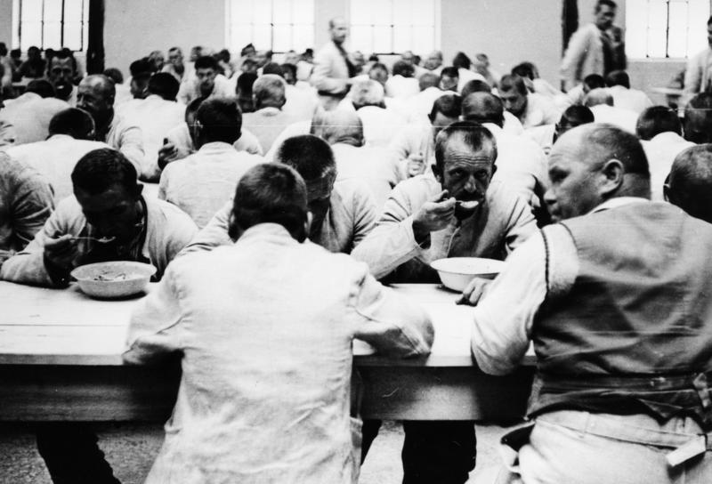 Dachau, Konzentrationslager Schutzhaftlager Dachau.- Gefangene beim Essen im Mai 1933.